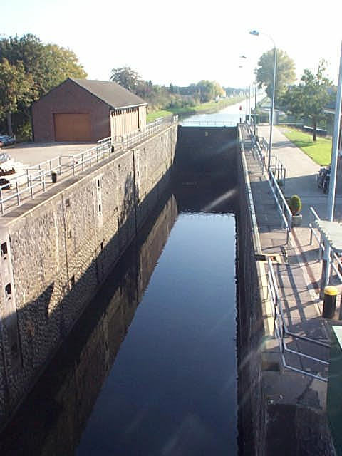 Spoyschleuse in Brienen am Niederrhein